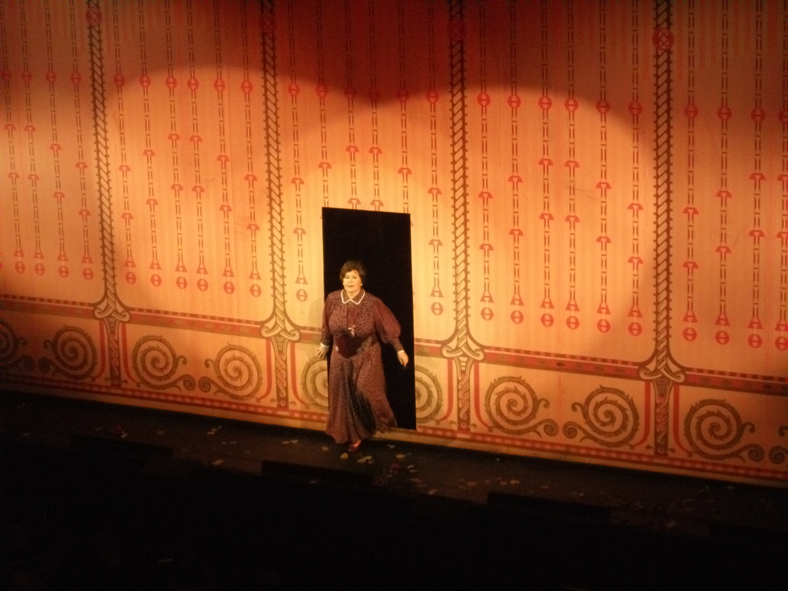 Lehoczky Zsuzsa a Budapesti Operettszínházban játszotta a Berta szerepét a Cigányszerelemben.